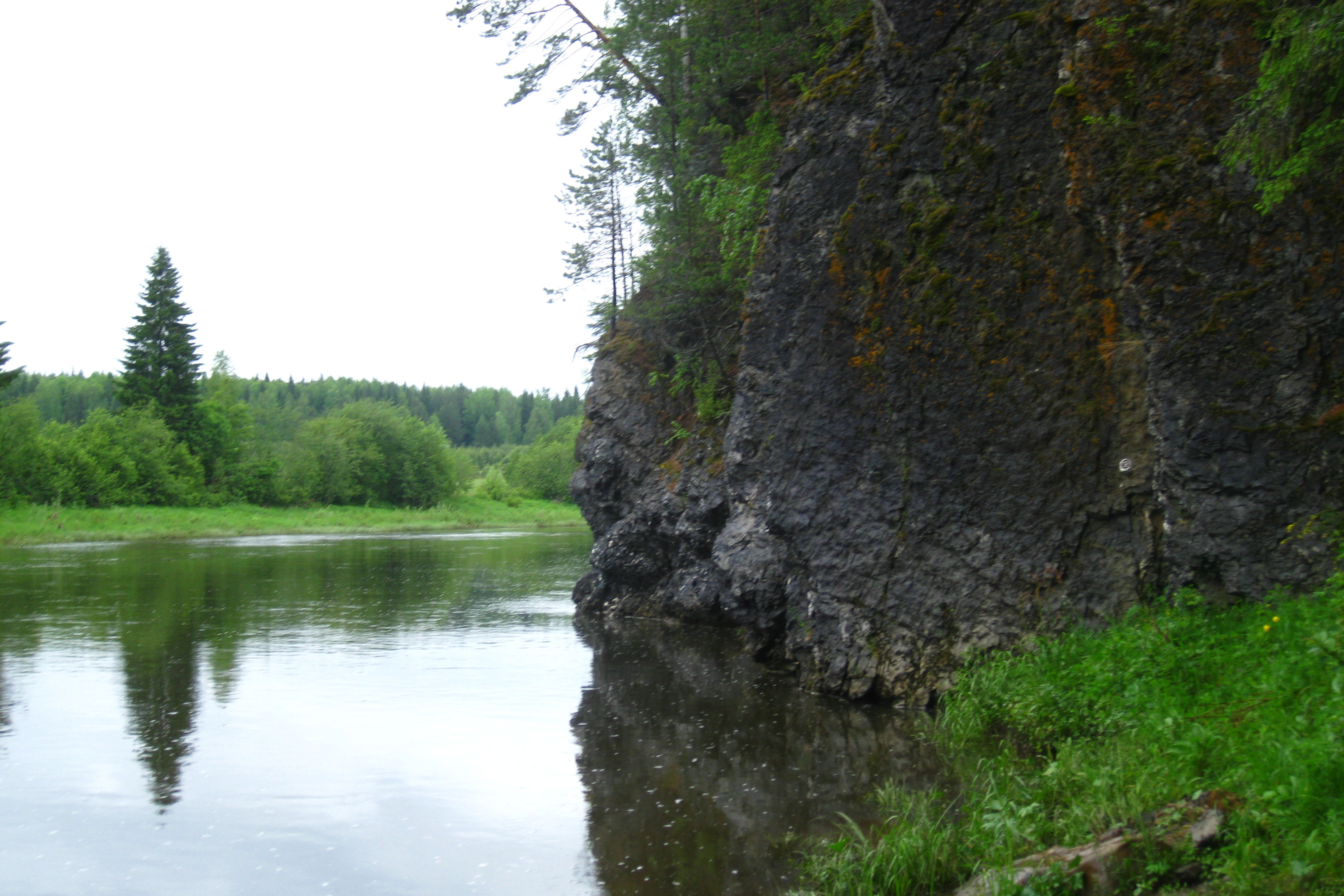 Скальный выход на реке Межевая Утка близ деревни Баронская